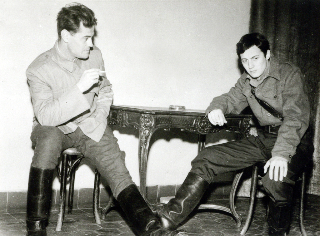 Primož Kozak, Afera, Oder 57. Na fotografiji: Lojze Rozman (Simon), Ali Raner (Kristjan).